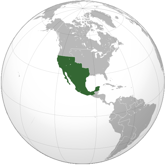 Proyeccion de la Primera Republica Federal de Mexico (1823-1835)